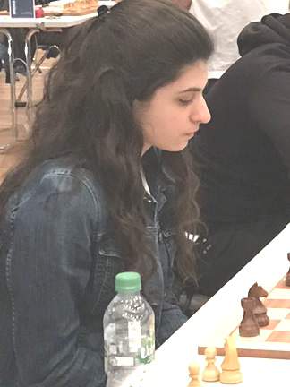 Anna-Maja Kazarian, Runde 8 der Grenke Chess Open 2019 in Karlsruhe.